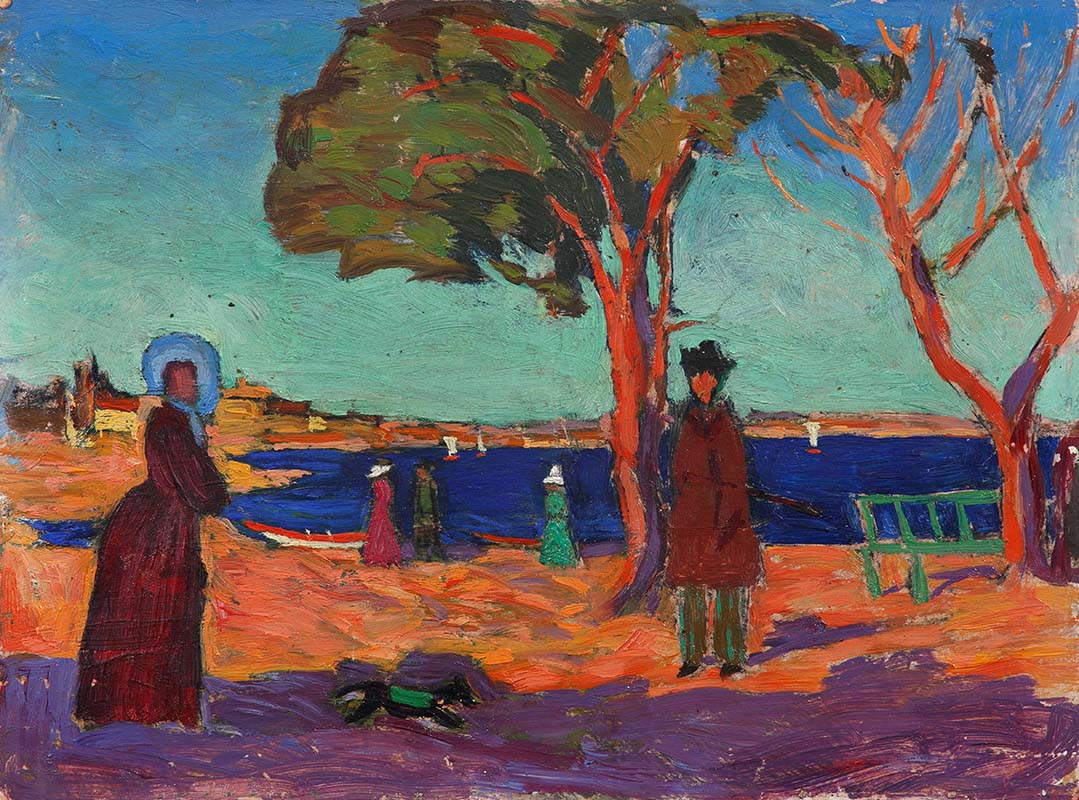 "Прогулка", 1917, художник Борис Николаевич Царнах (1894 - 1938), Картон, масло. 21,8×29 см. Частное собрание Романа Бабичева.